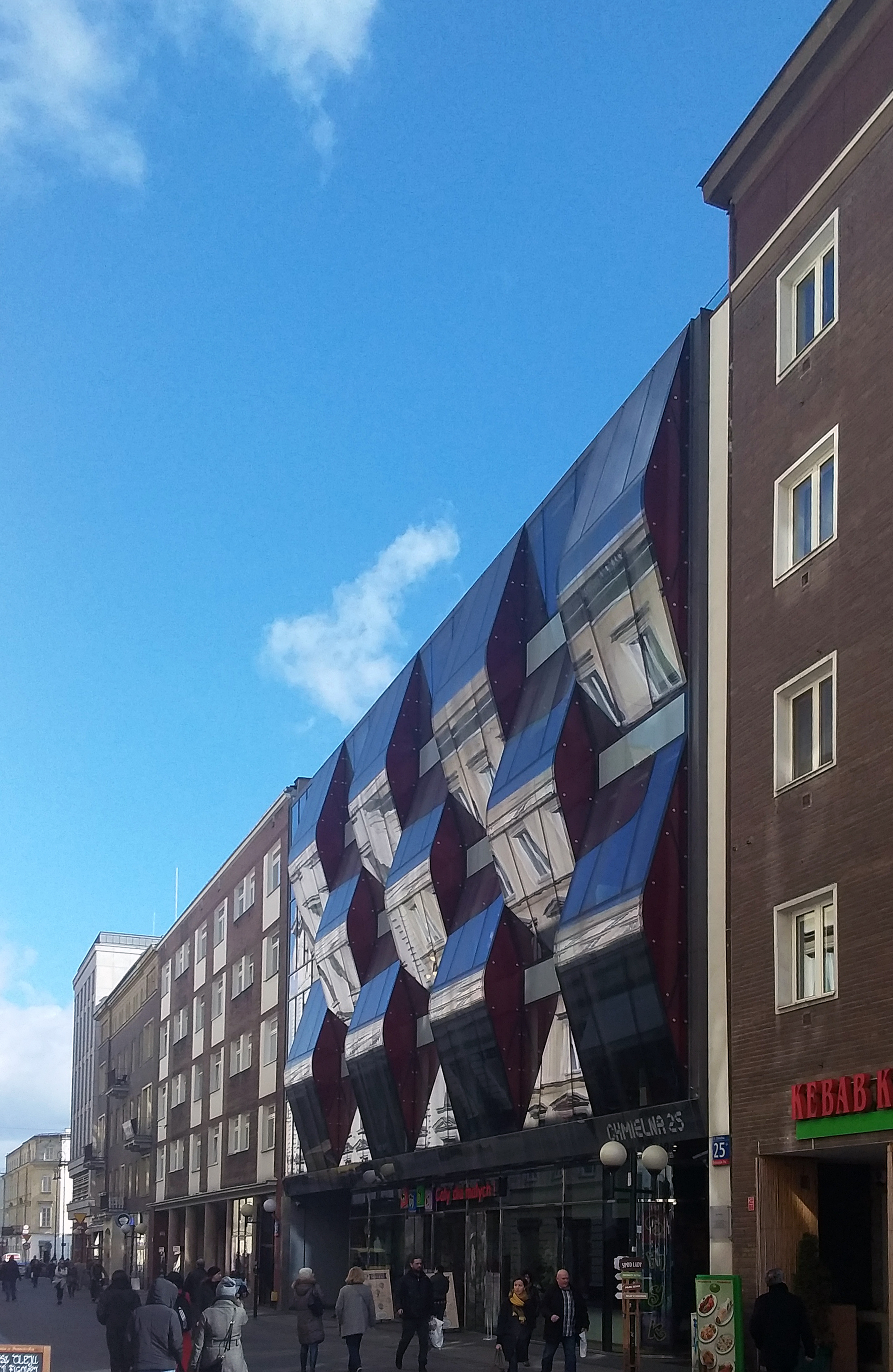 Budynek Chmielna 25 w Warszawie